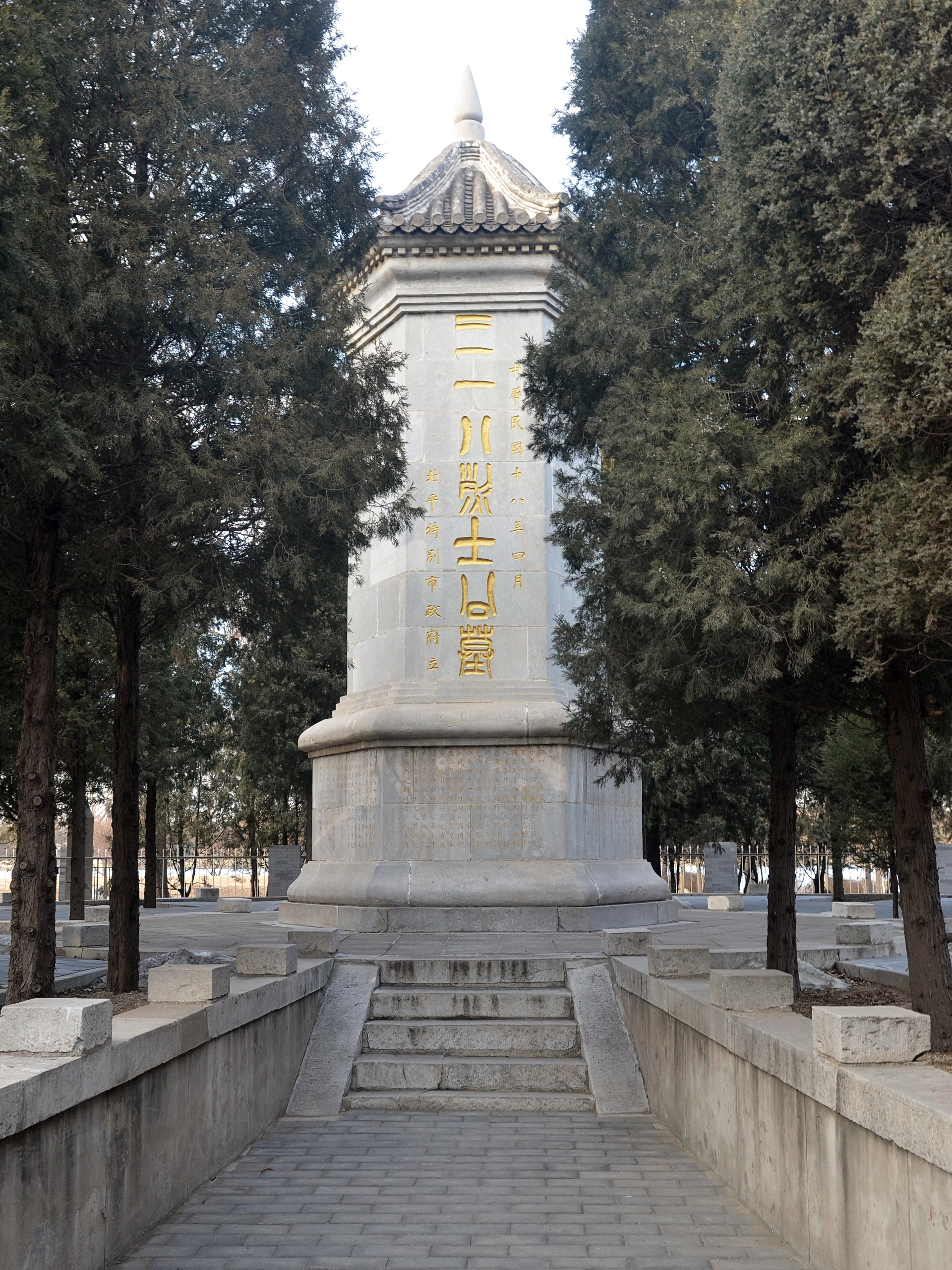 “三·一八”烈士墓位于圆明园“九洲清宴”遗址奉三无私殿前院偏东侧，1929年在“三·一八”惨案3周年时建成。石砌圆形台基上立有大理石墓碑。墓碑四周有28位烈士的坟茔。